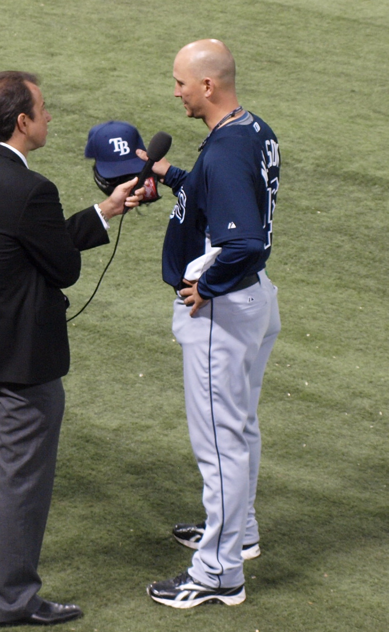 Joe Nelson